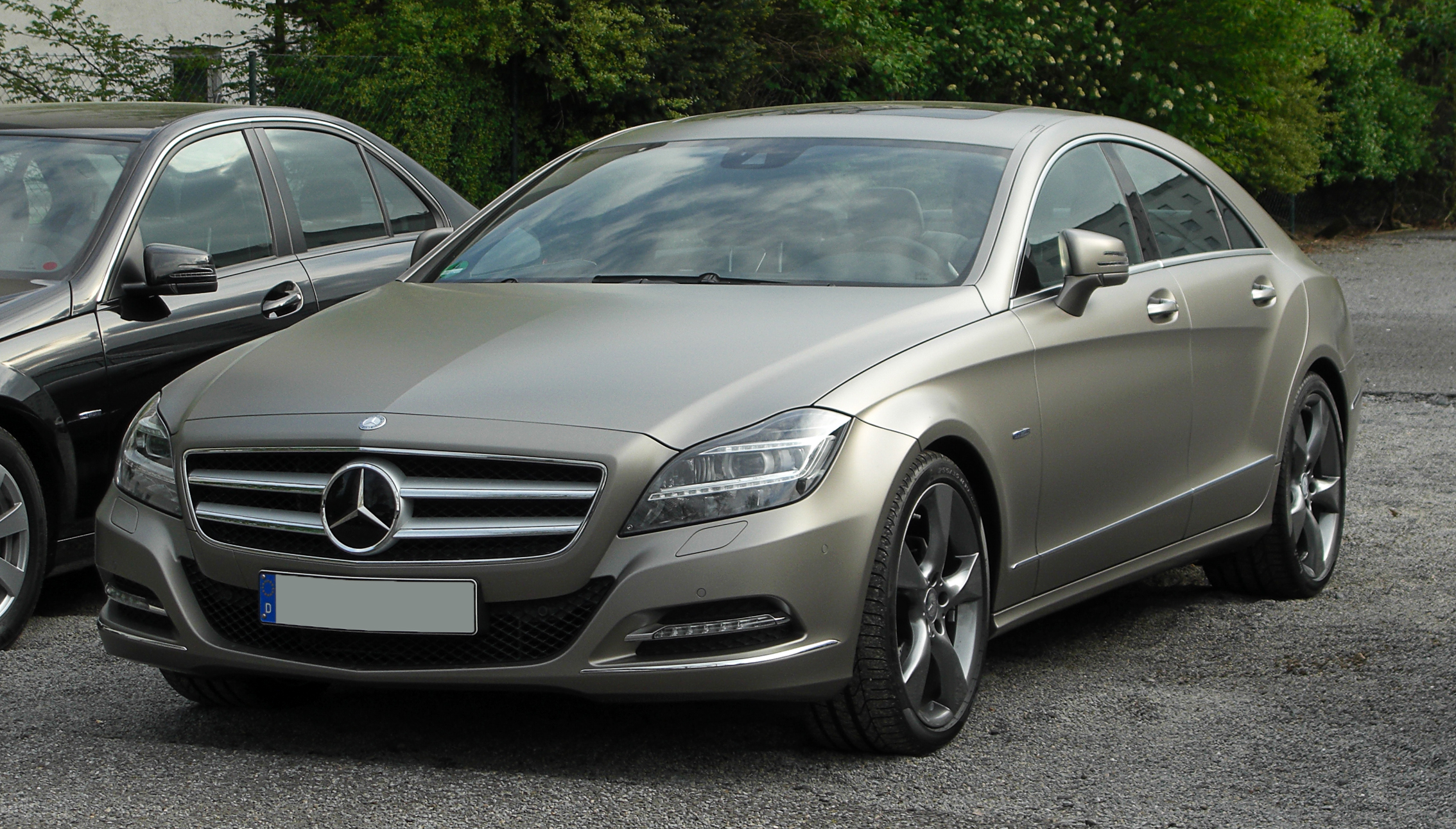 Mercedes-Benz CLS 350 BlueEFFICIENCY Edition 1 (C 218)